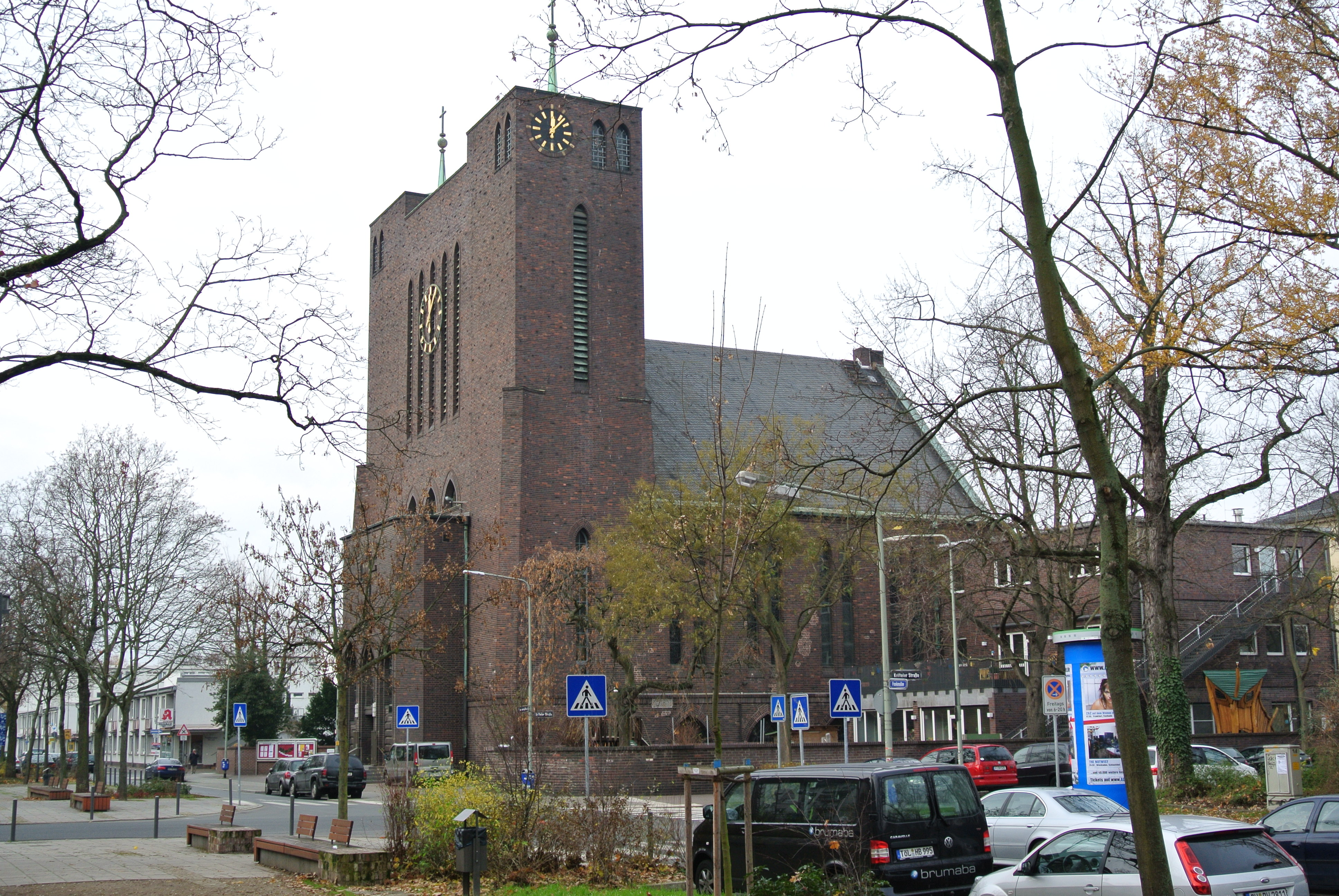 Evangelische Friedenskirche im Frankfurter Gallus an der Frankenallee vom Architekten Karl Blattner im Jahr 1928 eingeweiht